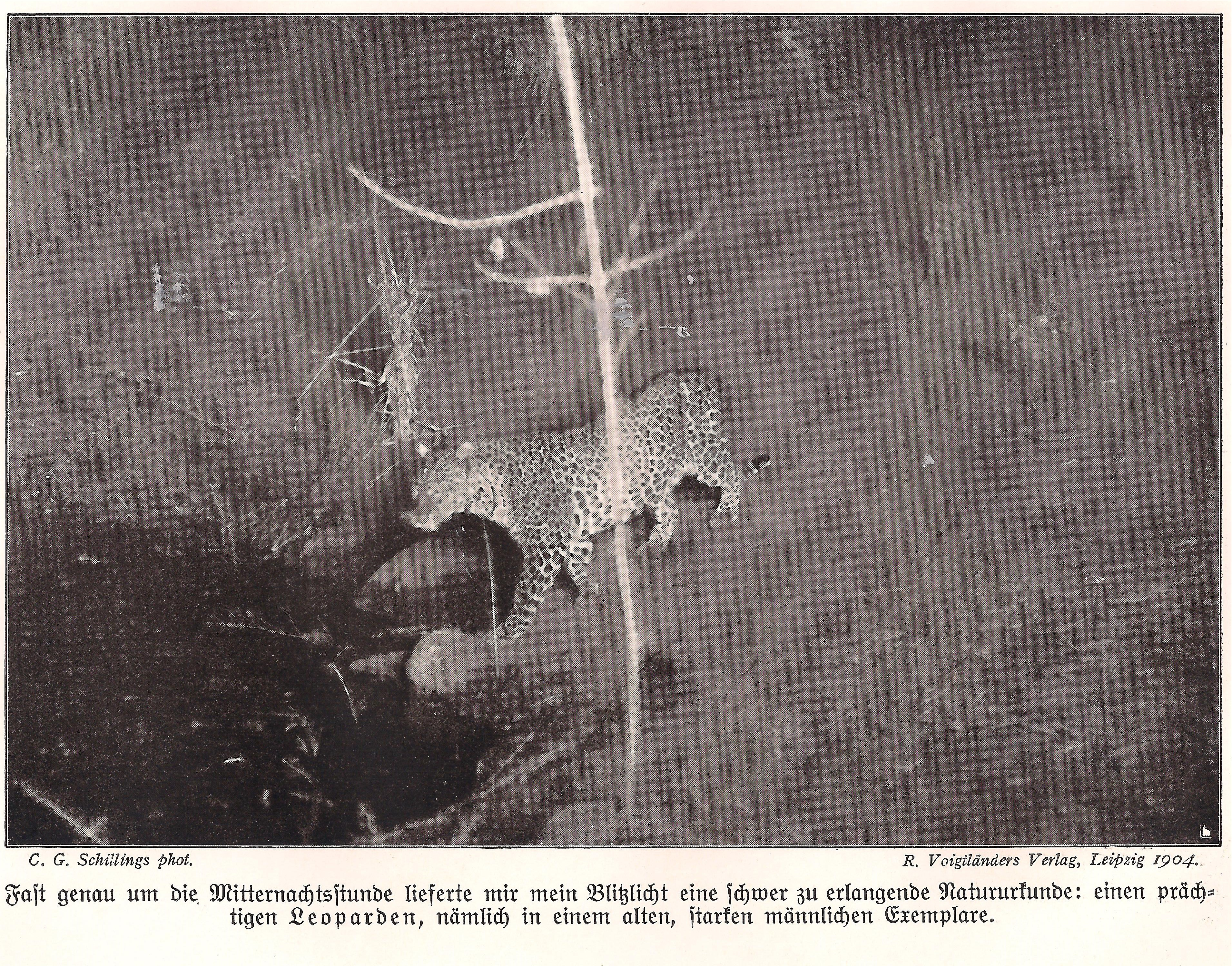 Carl Georg Schillings Blitzlichtaufnahme eines Leoparden veröffentlicht 1905